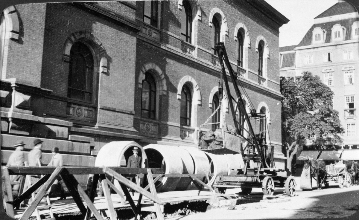 Arbeid med ny rørledning til Bisletbekken under Universitetsgata ved Nasjonalgalleriet i nr. 13. Løftekran, sperrebukker. Hester med kjerrer. Savoy hotell i bakgrunnen. Fra begynnelsen på 1930-tallet.